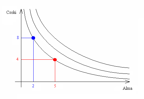 Közömbösségi görbék , illusztráció a Fogyasztáselmélet (mikroökonómia) cikkhez